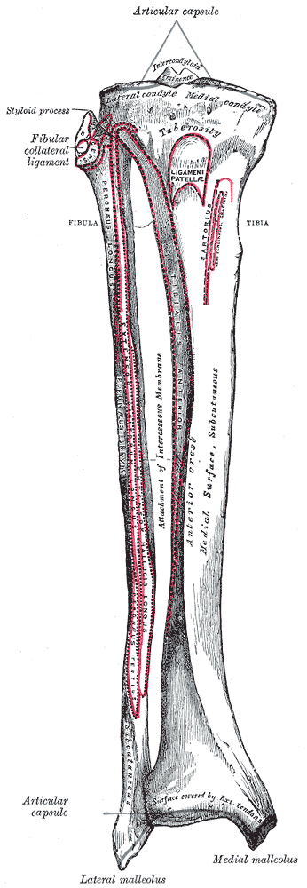 Unterschenkel (Knochen)